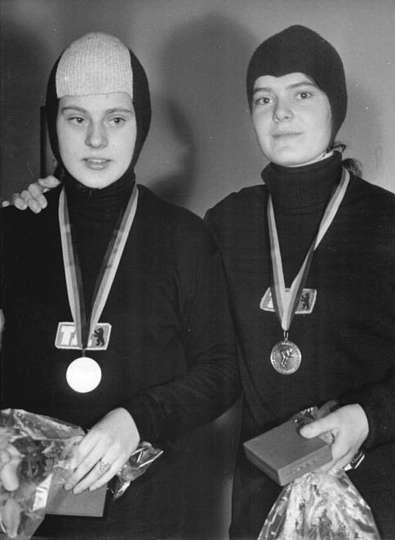 Sigrid Wienke, Herlind Hürdler Zentralbild Wendorf 23.1.1965 Berlin: Deutsche Eisschnellauf-Meisterschaften Vier Titel wurden am ersten Tag der Deutschen Meisterschaften im Eisschnellauf auf der Kunsteisbahn im Berliner Sportforum am 22.1.1965 bereits vergeben. Ex-Olympiasiegerin Helga Haase und Helmuth Kuhnert trugen sich gleich zweimal in die Meisterliste ein. UBz: Über 1500m der Frauen bewiesen die beiden erst 15jährigen Sigrid Wienke (links, 3.Platz) und Herlind Hürdler (2. Platz, beide TSC Berlin) erneut, daß der Nachwuchs stark nach vorn drängt und bereits mit guten Leistungen aufwartet. Abgebildete Personen: Hürdler, Herlind: Eisschnelläuferin, DDR